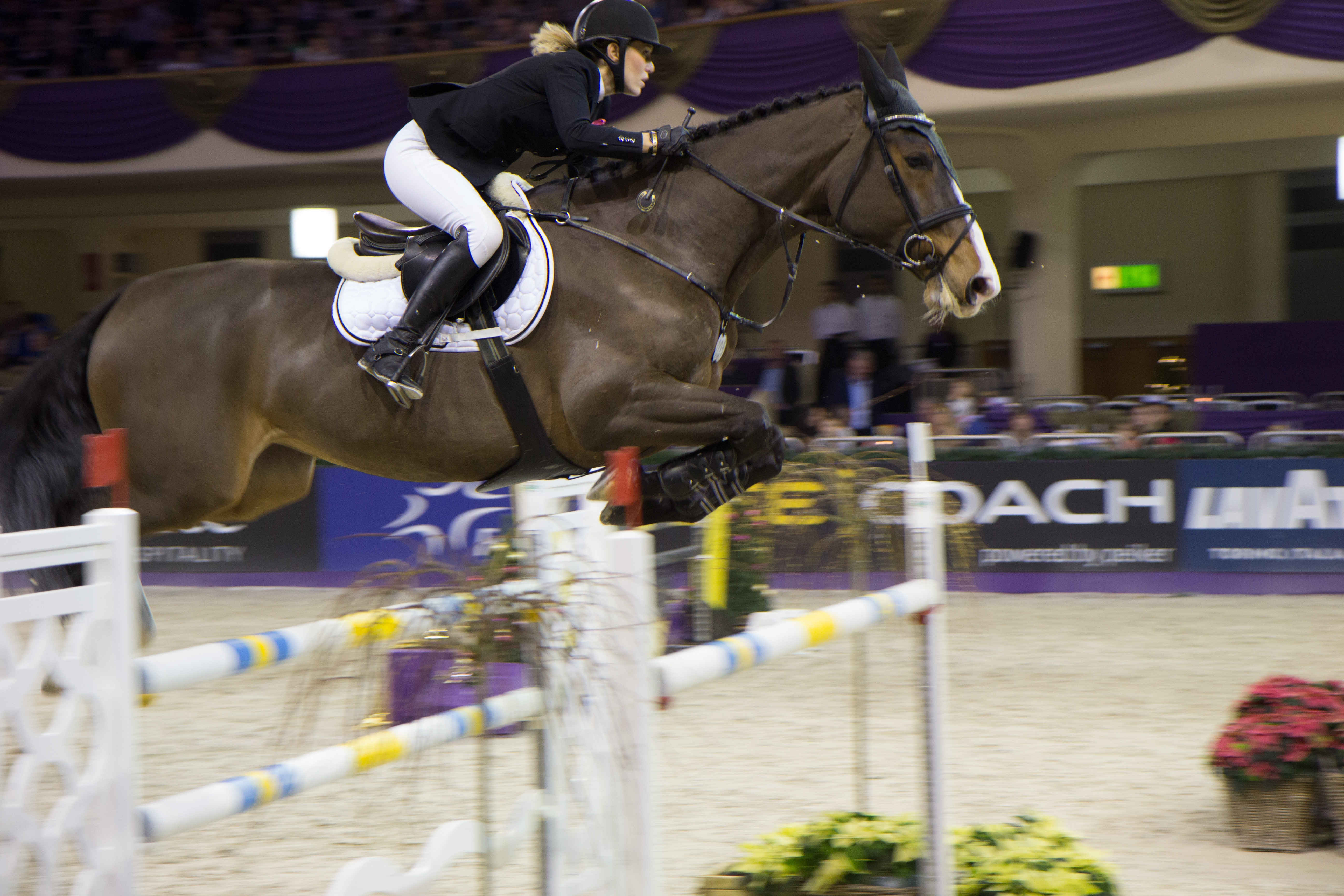 Internationales Festhallen Reitturnier 2017 in Frankfurt. Janne Friederike Meyer-Zimmermann auf Fortuna451